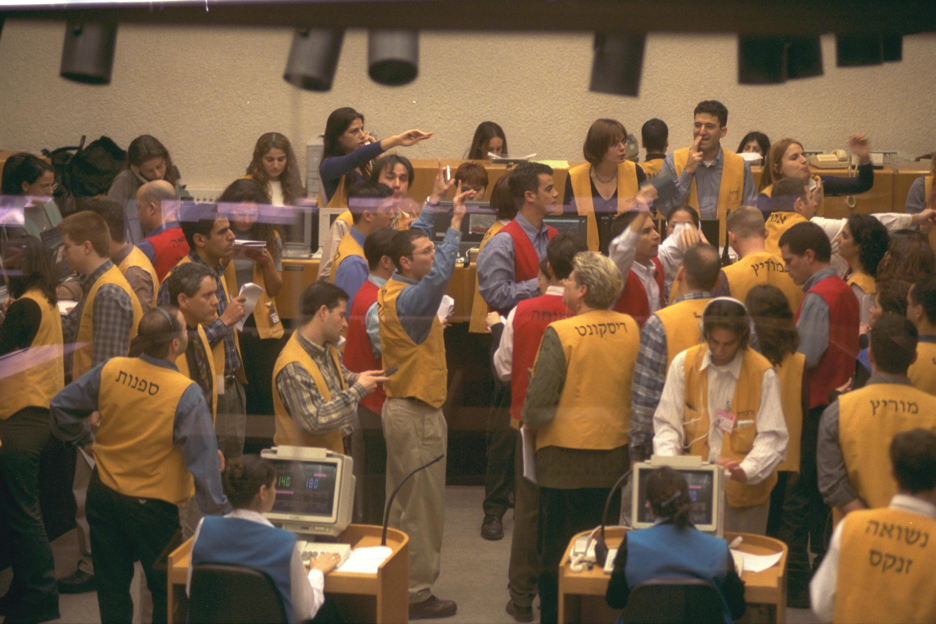 The Tel Aviv Stock Exchange. הבורסה לניירות ערך בתל אביב Photo: AMOS BEN GERSHOM, 02/10/1999